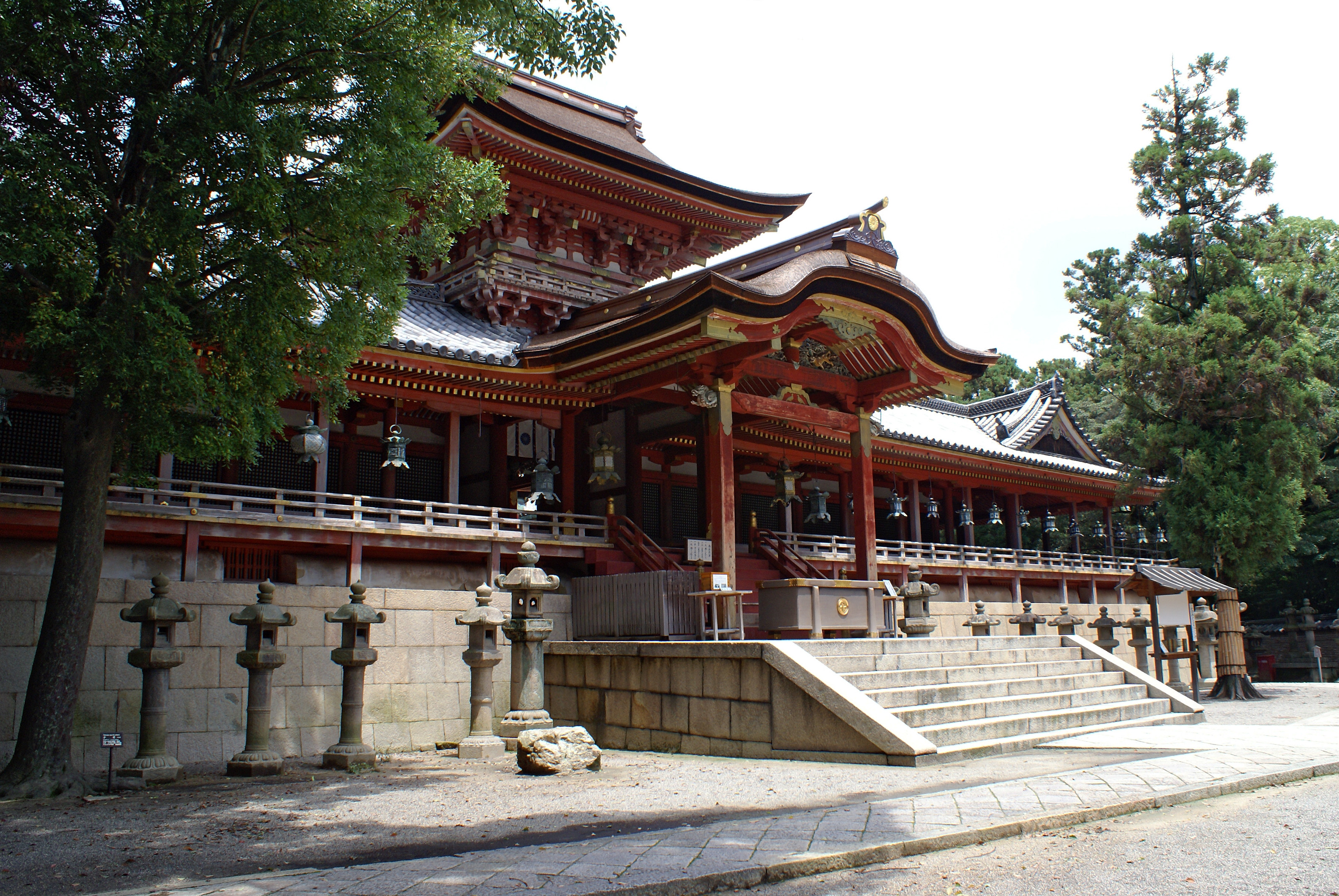 Iwashimizu Hachimangu in Yawata, Kyoto, Japan